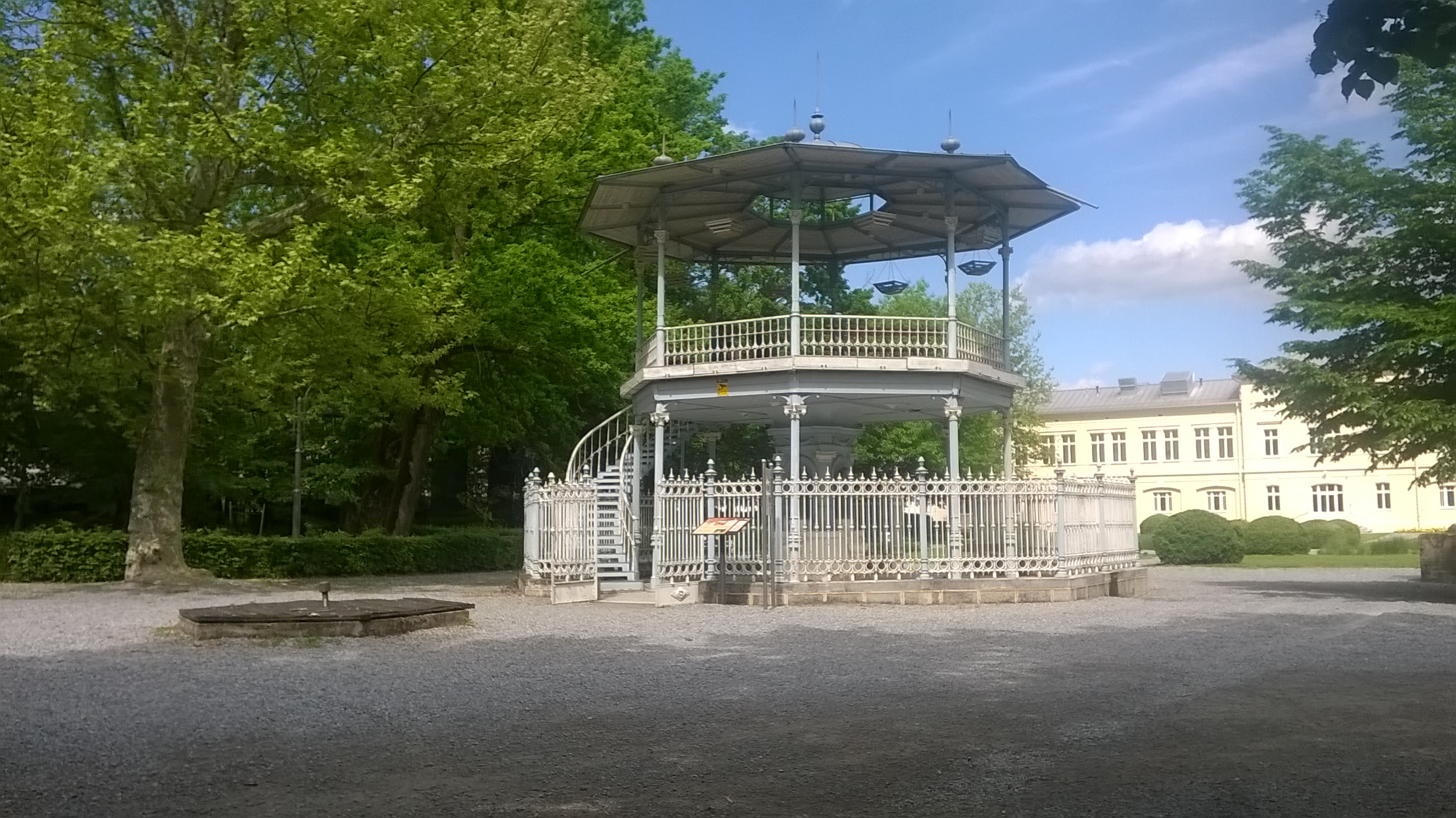 Kurbrunnen, Lipik